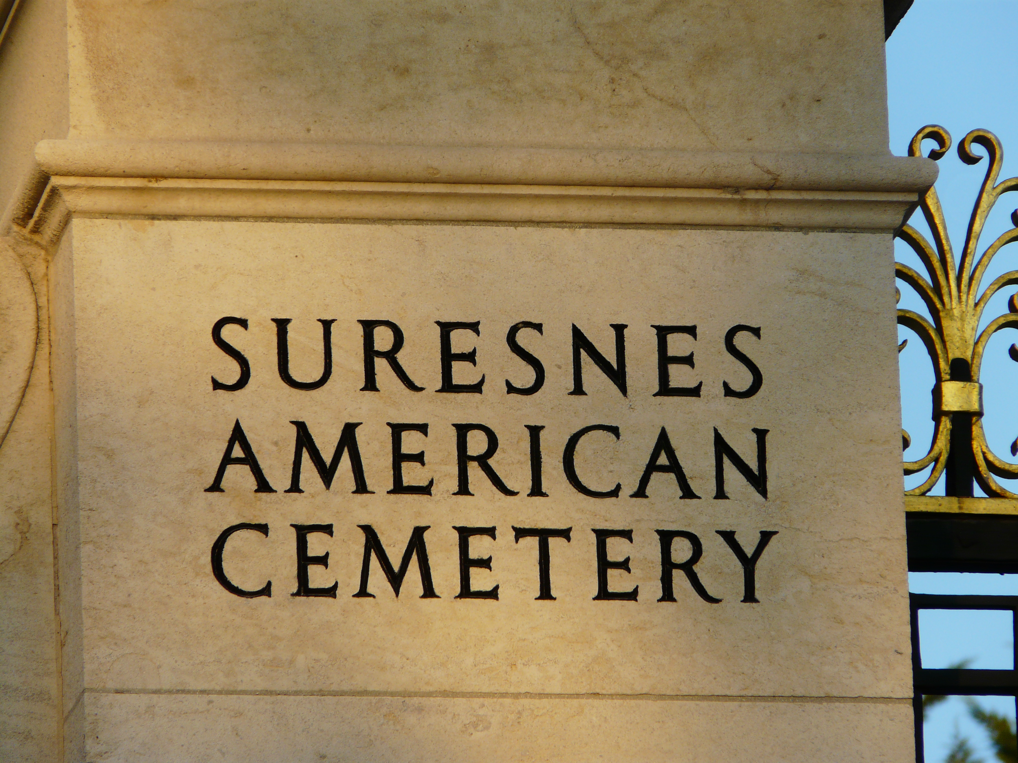 Matinée de fin d'été , 2014.